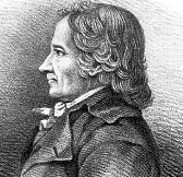 Johan Christian Fabricius